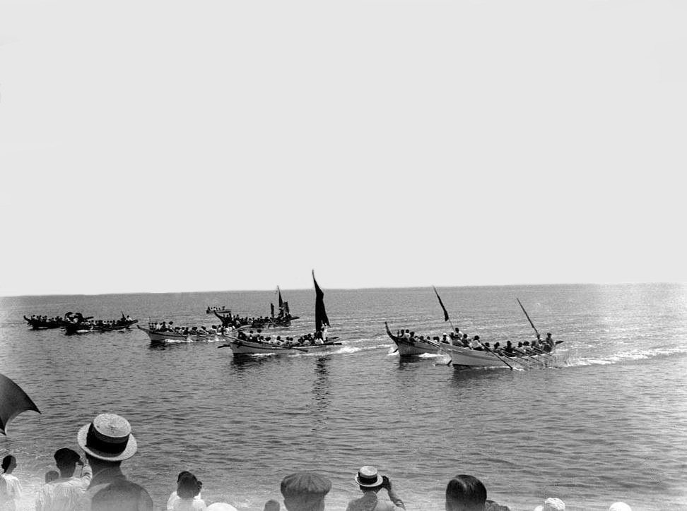 Festa de S'amorra amorra en Lloret, regata amb els llaguts de pesca. Enric Ribas i Virgili (Entre 1920 i 1930)